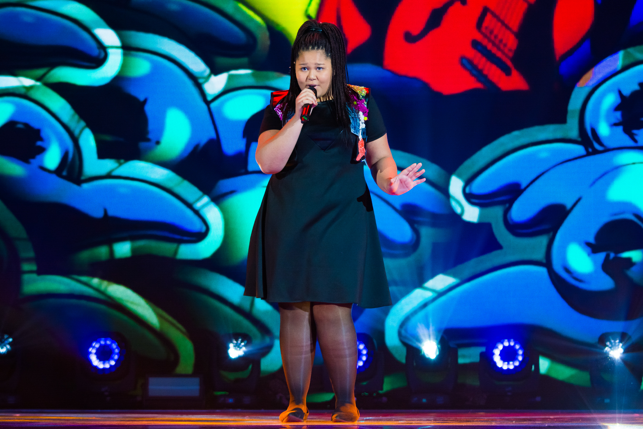 Дестини Чукуньере на сцене Детского Евровидения 2015 («Армеец», София) во время генеральной репетиции